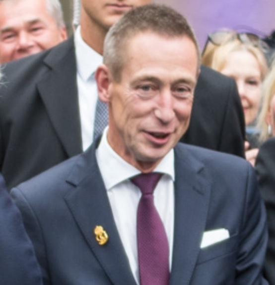 Drottning Silvia firar Carl XVI Gustafs 40 år på tronen på inre borggården på Stockholms slott den 15 september 2013.